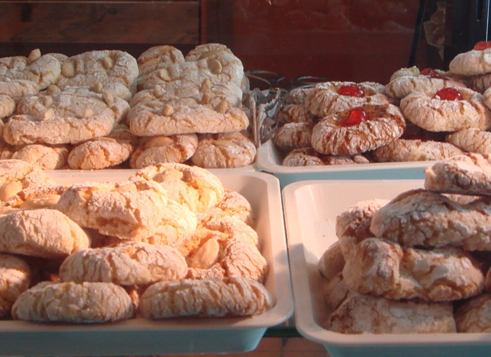 Biscotti alle mandorle, Siracusa, Sicilia. Ritaglio di